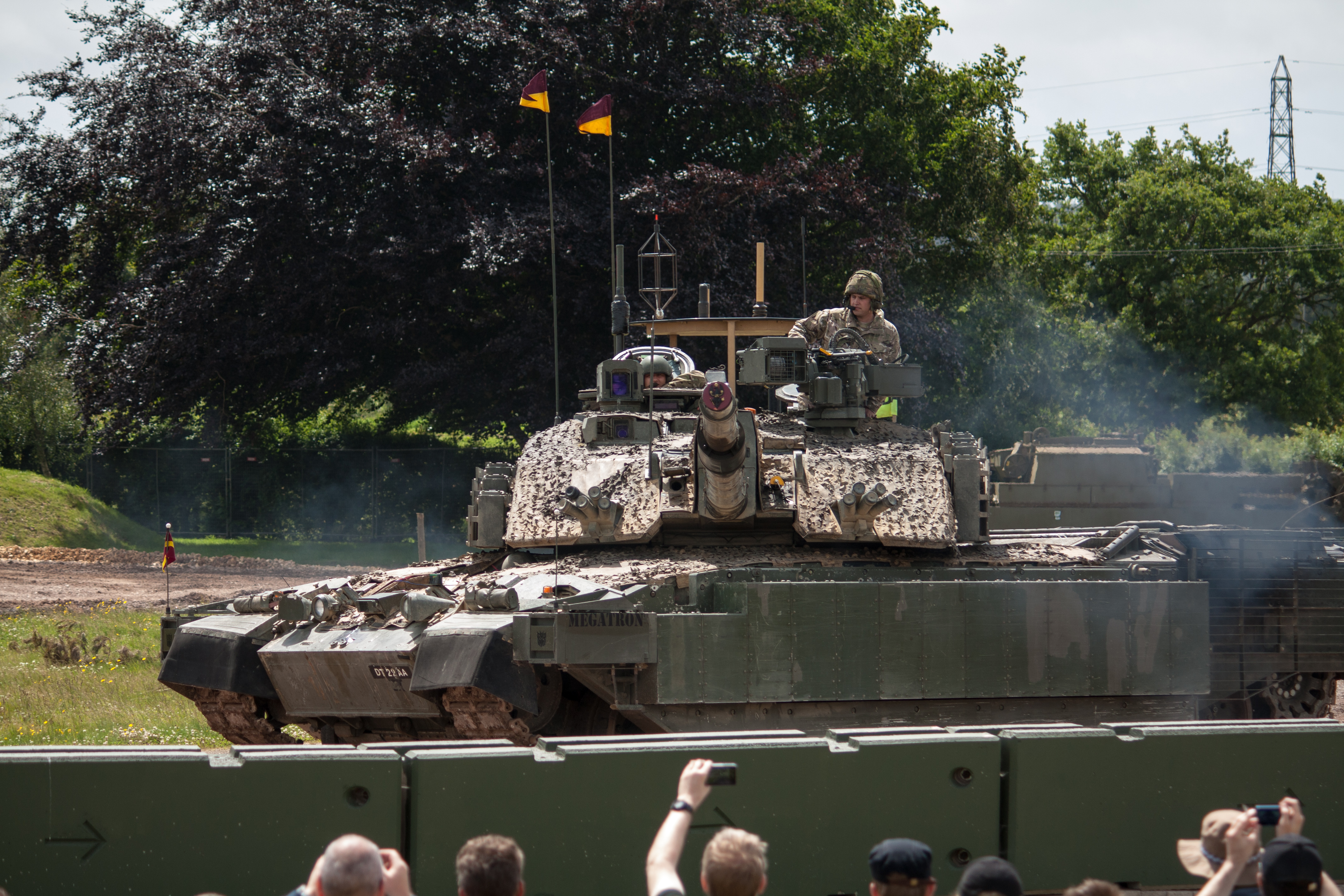 Challenger 2 FV4034 - 'Megatron'